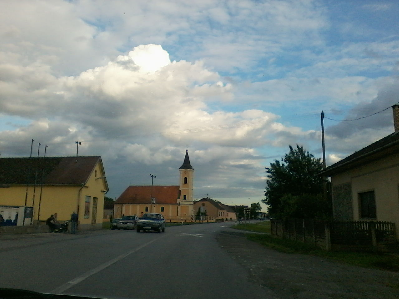 Rakitovica, općina Donji Miholjac.